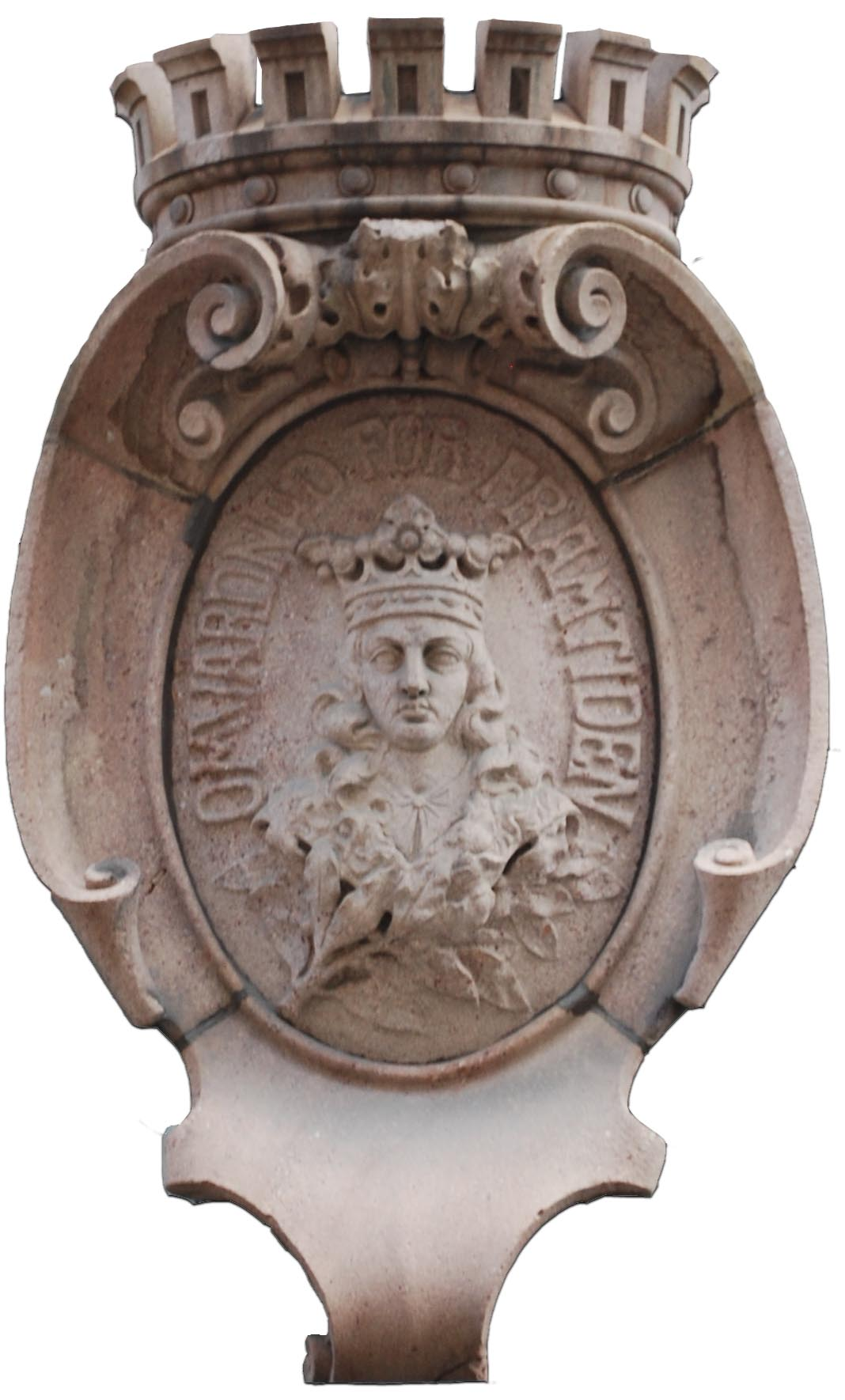 Portalsköld på Stockholms Stads Sparbank